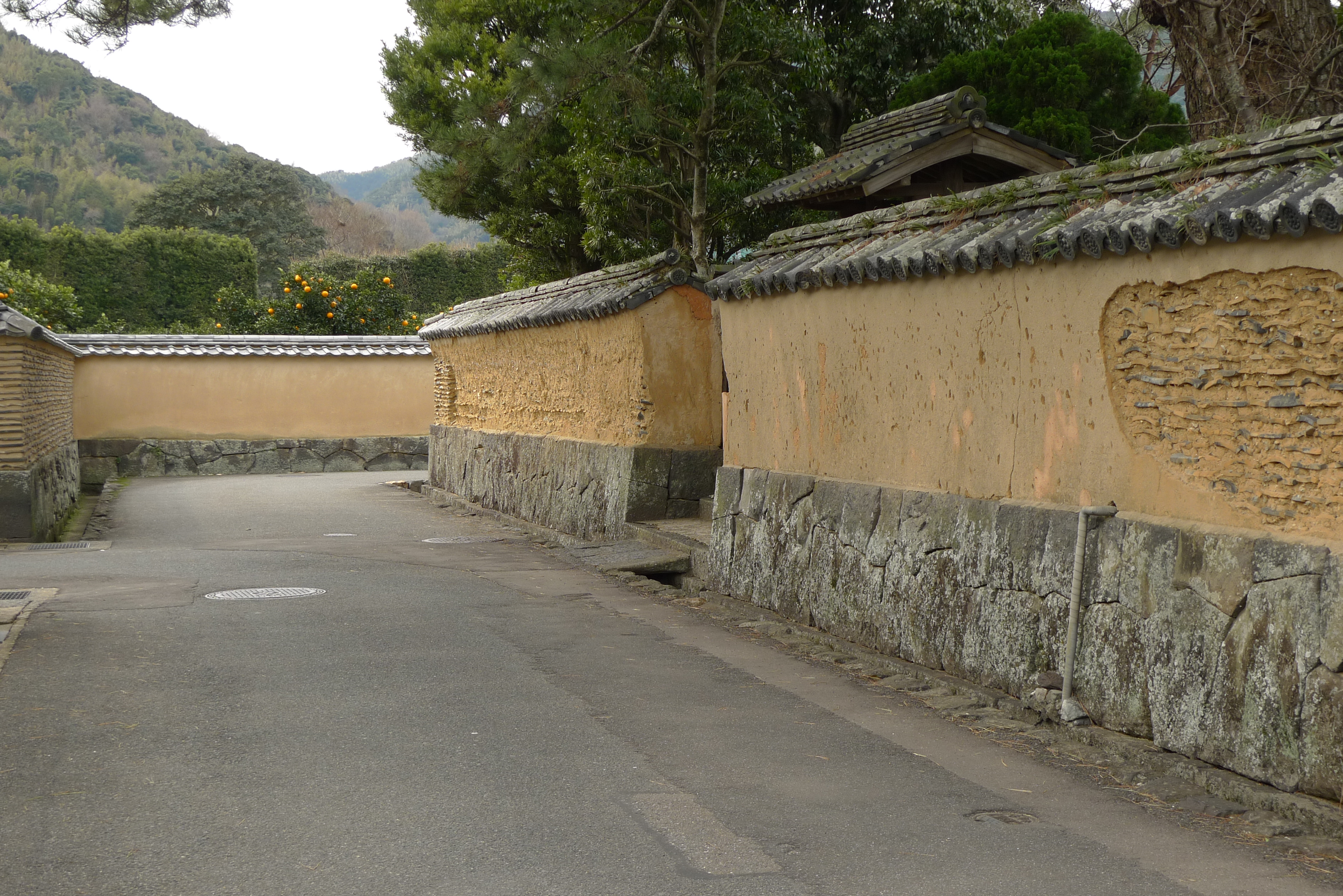 萩市平安古の鍵曲